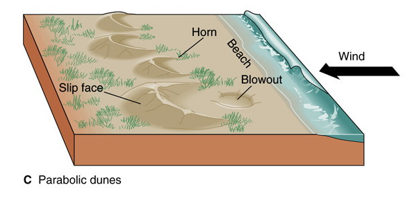 ภาพ 5 Parabolic